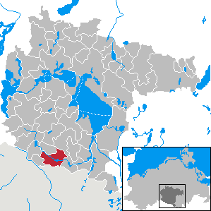 Wredenhagen im Landkreis Müritz, Mecklenburg-Vorpommern